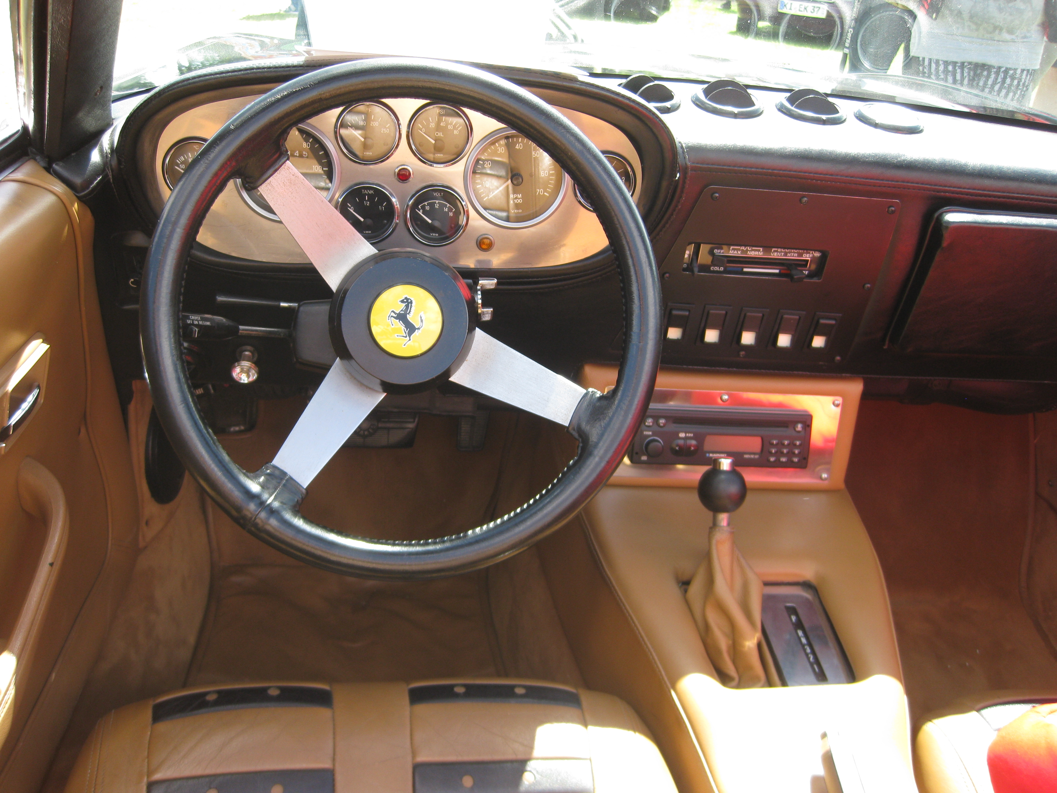 Cockpitansicht Ferrari Daytona Replika (Miami Vice) - ja, da hat Don Johnson drin gesessen :-)